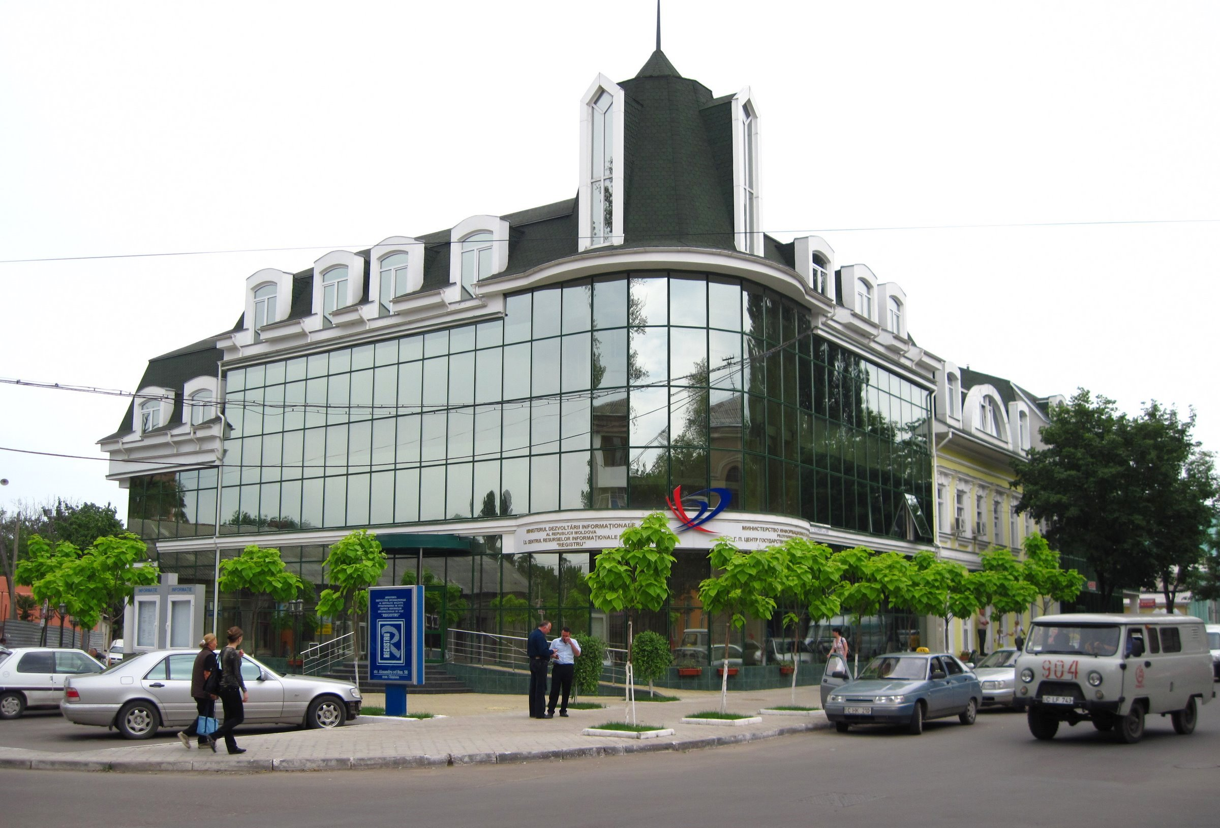 REGISTRU, State Information Resources Centre at Mihai Eminescu - Alexandru cel Bun crossroads